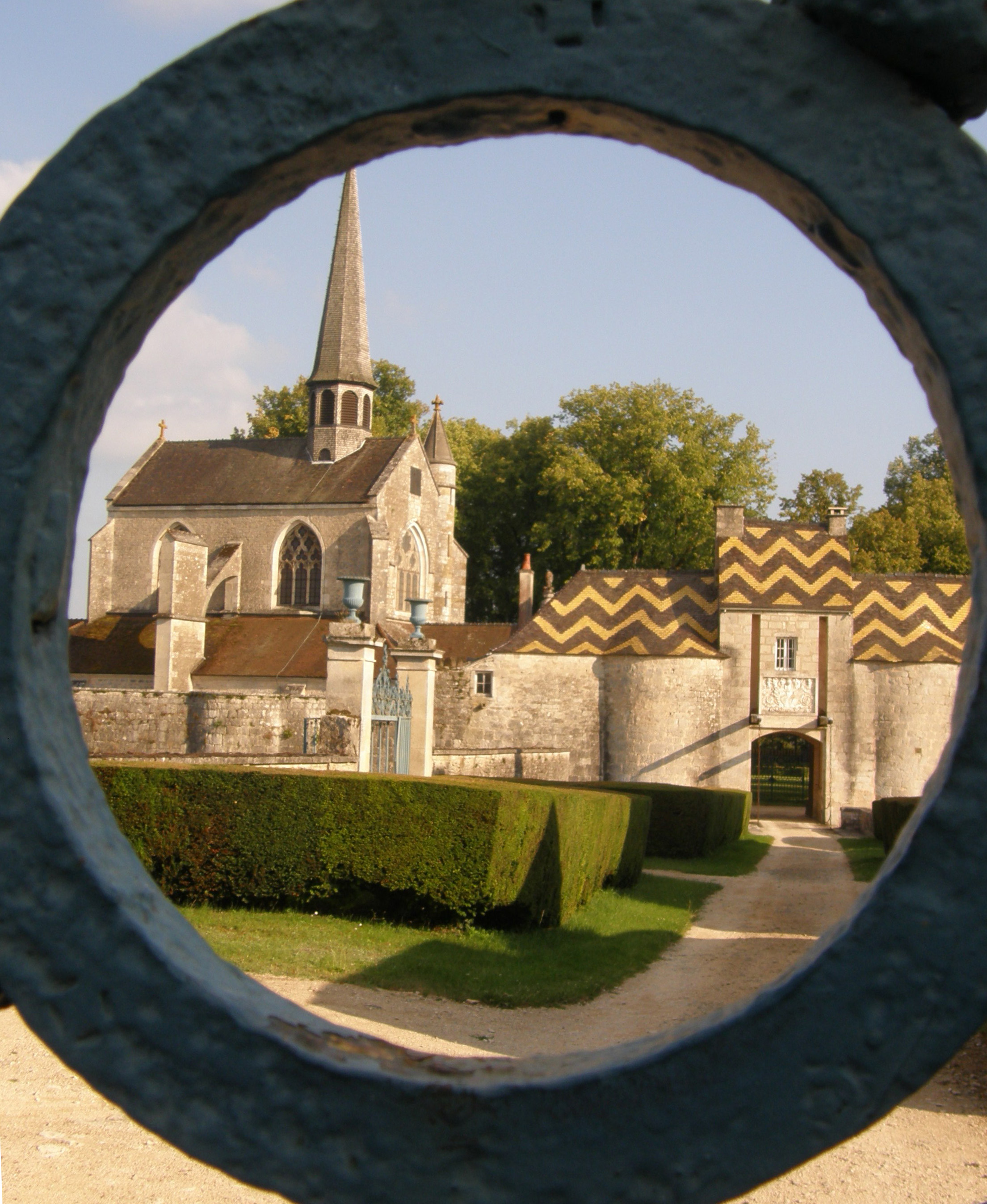 Entrée et collégiale du chateau .